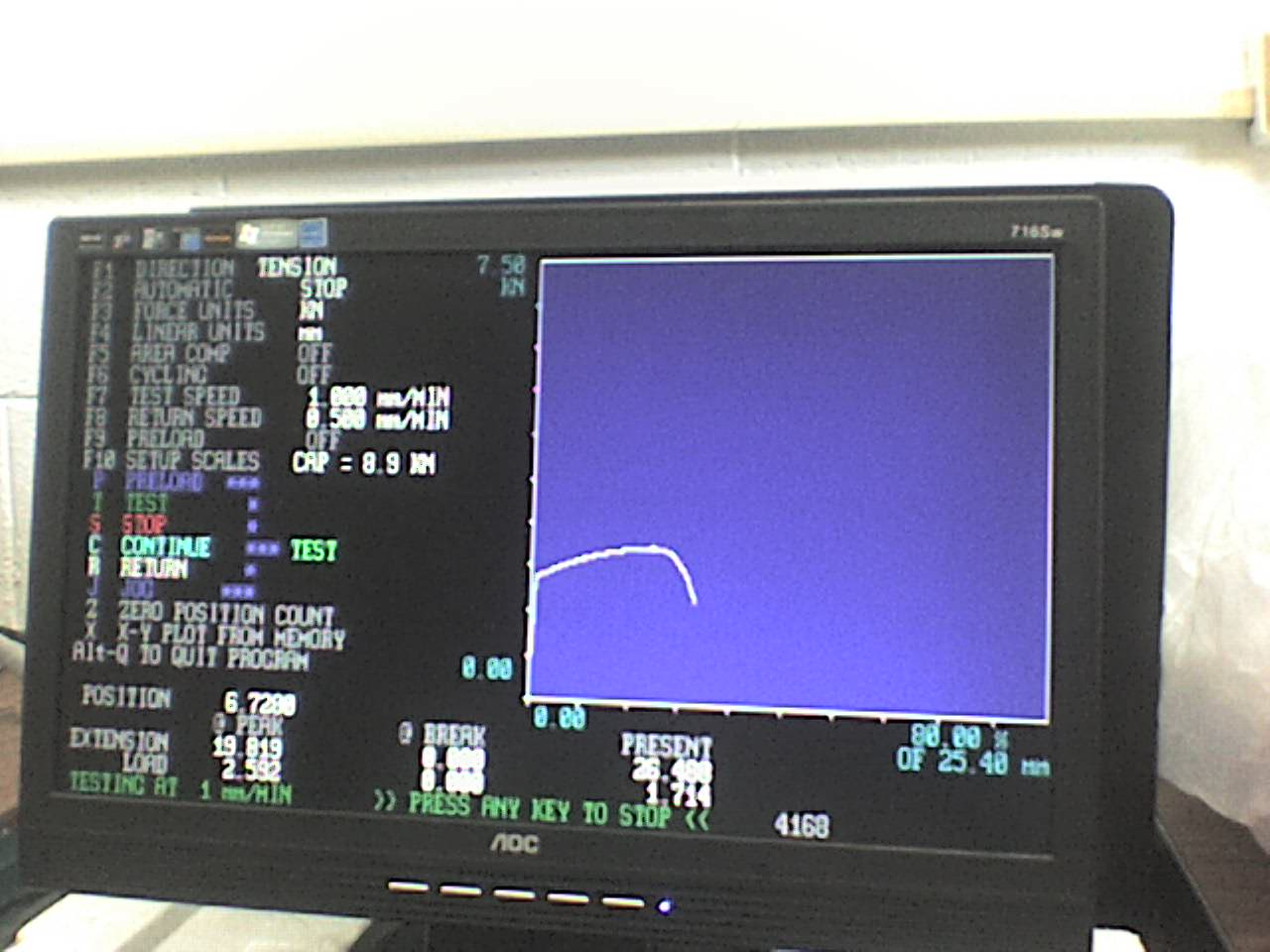 Máquina de ensayo de tensión por computadora, del laboratorio de Introducción a los Materiales, Universidad Autónoma Metropolitana, UAM Azcapotzalco.